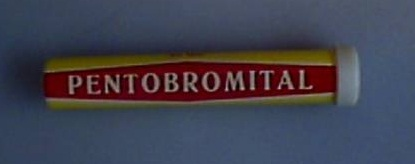 Pentobromital-pakkaus.